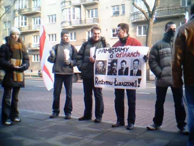 Demonstracja Polaków i Białorusinów przed siedzibą Ministerstwa Spraw Zagranicznych RP przeciwko współpracy Polski z władzami białoruskimi.